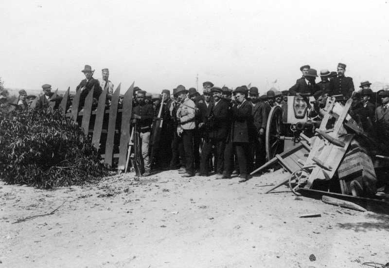 A revolução de 5 de Outubro de 1910